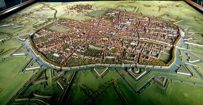 Plan de Tournai